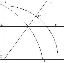 Método para encontrar a curva denominada quadratriz.